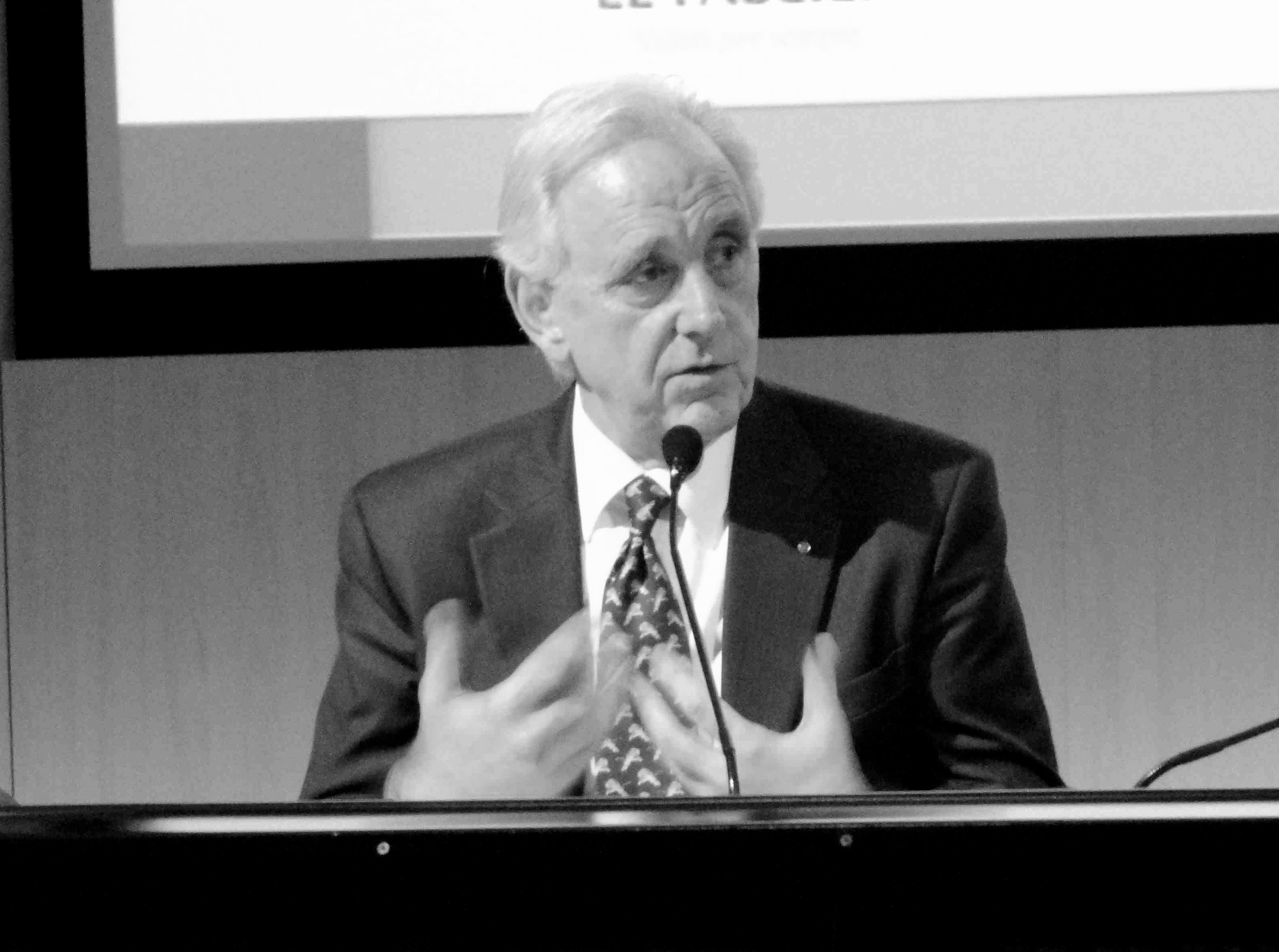 Marzio Bonferroni durante un convegno